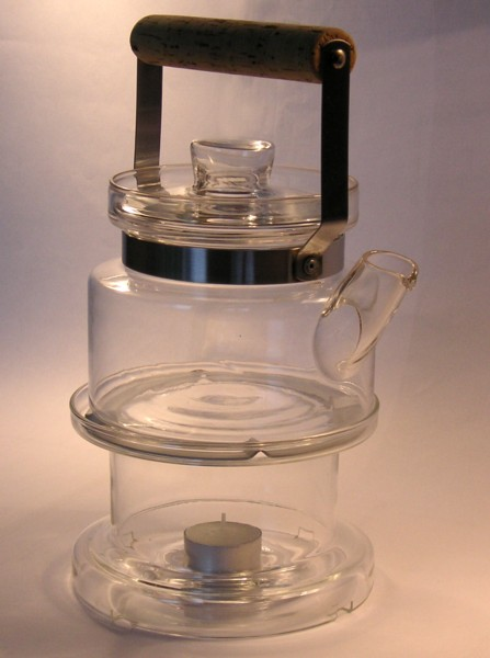 Signe Persson-Melins glaskanna för Boda Nova, 1971